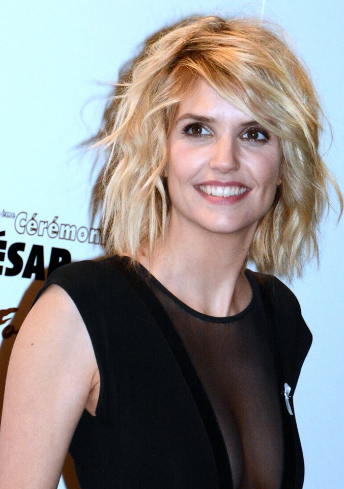 Laurence Arné à la cérémonie des César du cinéma